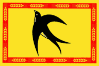 Флаг Бейсужёкского сельского поселения, Краснодарский край, Россия.